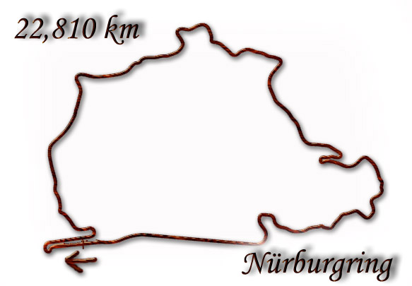 Plánek trati Nurburgring (Formule 1 se na této trati jela v letech 1951 1952 1953 1954 1956 1957 1958 1961 1962 1963 1964 1965 1966 ).